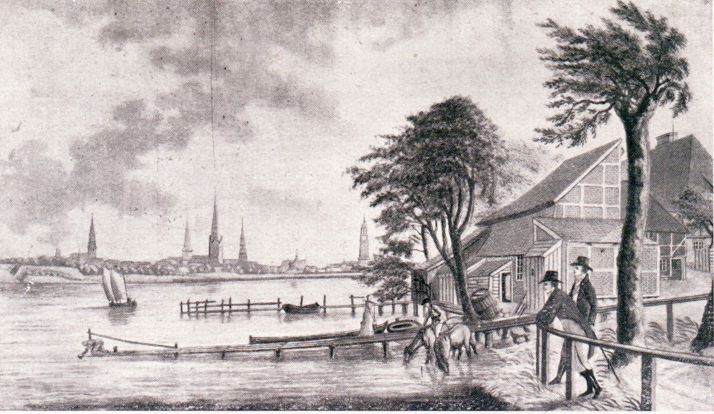 Die Alte Rabe, Gaststätte an der Alster Hamburg